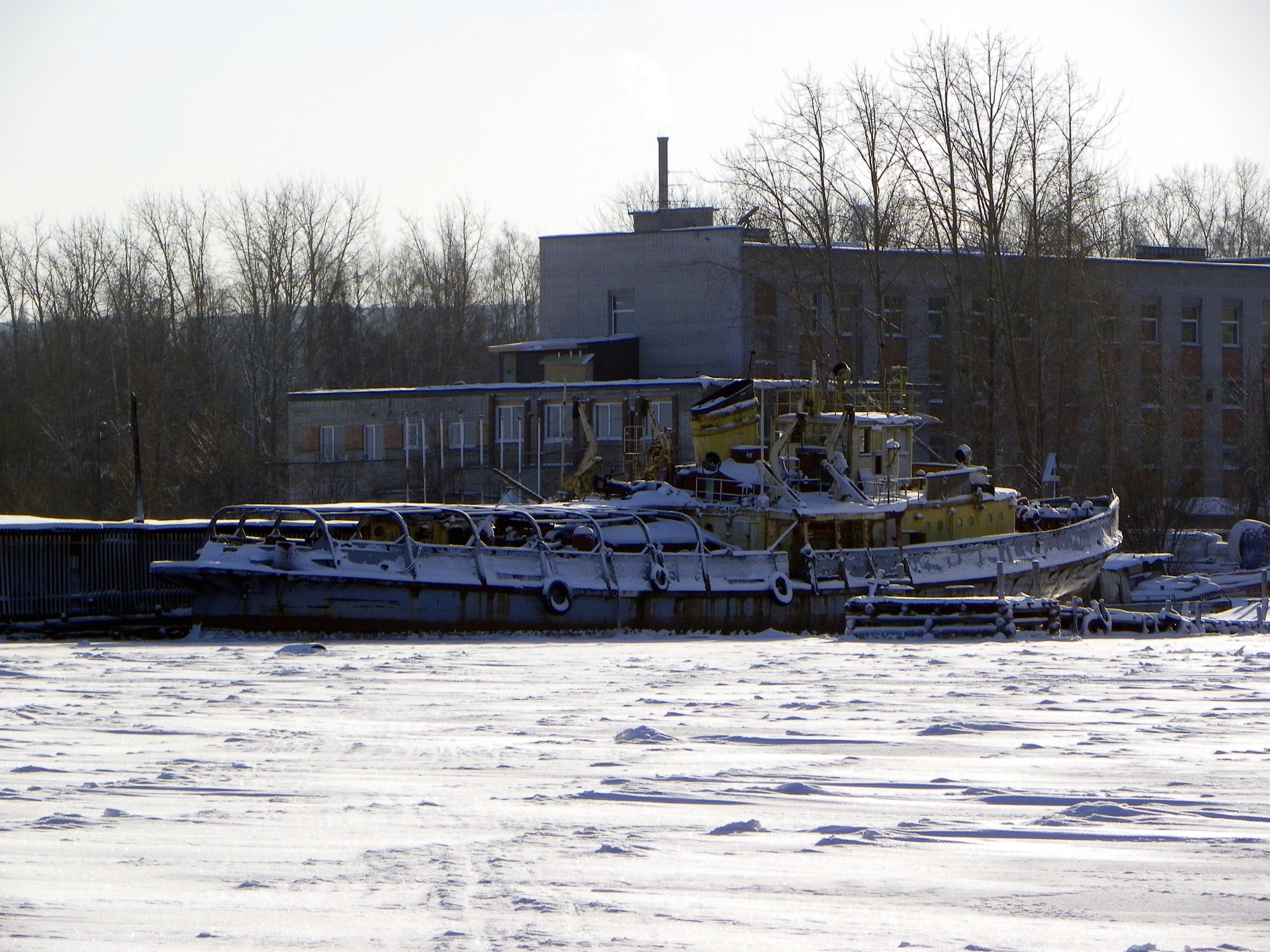 Озерный ледокол "Нева" в Петрозаводске